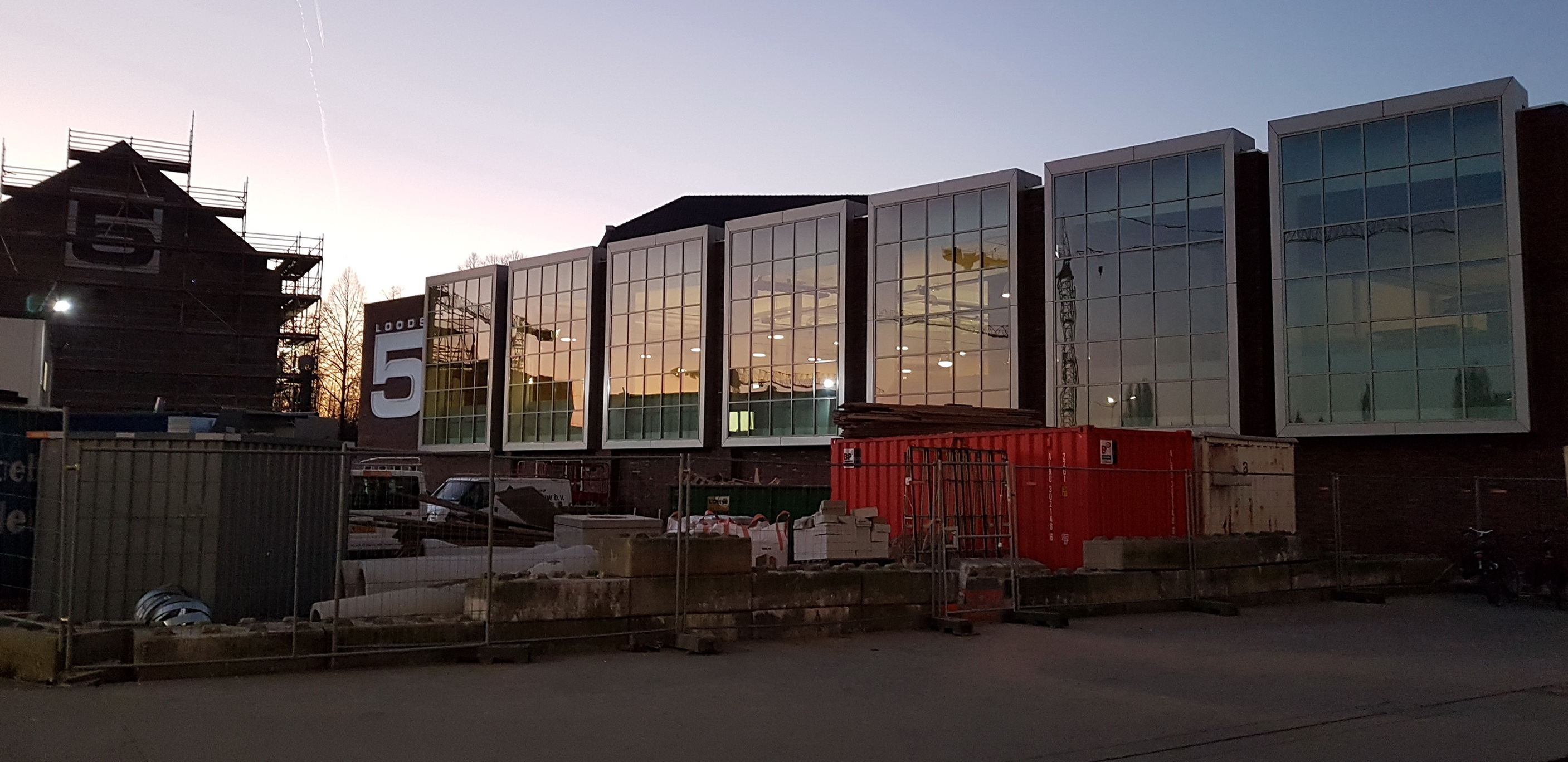 Inrichting van woonwinkel Loods 5, gevestigd in de Mouleursgebouwen en Kop van de Sphinx in het Sphinxkwartier, Maastricht.